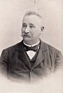 Varga Ferenc orvosdoktor, állatorvos, a budapesti állatorvosi akadémia tanára és igazgatója.